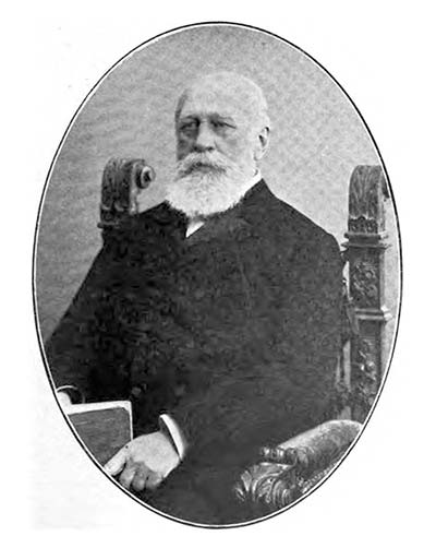 August Röhss (1836-1904)